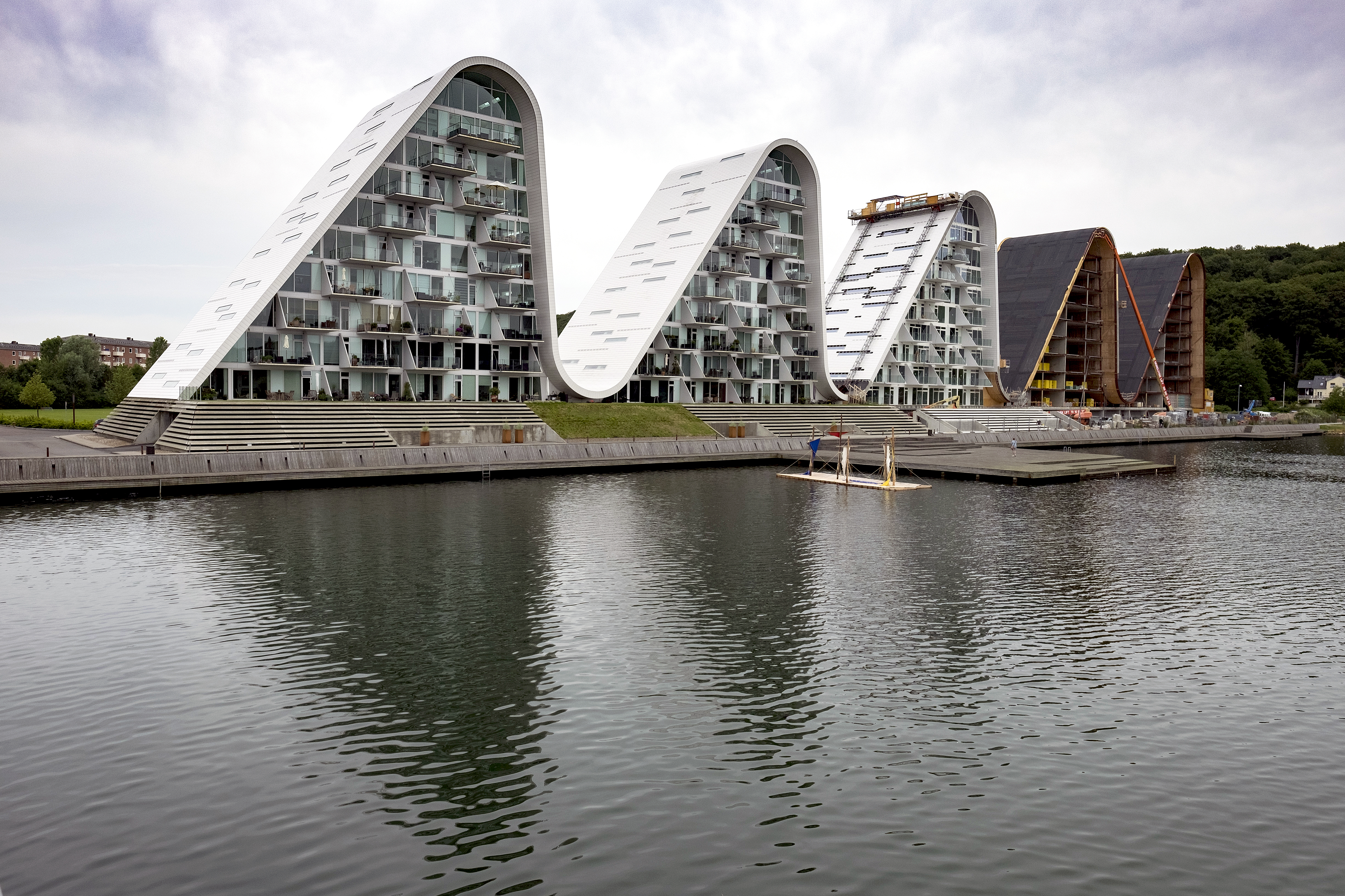 Bølgehusene i Vejle är ritade av Henning Larsen Architects. Photo: News Øresund - Johan Wessman. © News Øresund - Johan Wessman (CC BY 3.0)..Detta verk av News Øresund är licensierat under en Creative Commons Erkännande 3.0 Unported-licens (CC BY 3.0). Bilden får fritt publiceras under förutsättning att källa anges. .The picture can be used freely under the prerequisite that the source is given. News Øresund, Malmö, Sweden.News Øresund är en oberoende regional nyhetsbyrå som är en del av det oberoende dansk-svenska kunskapscentrat Øresundsinstituttet.